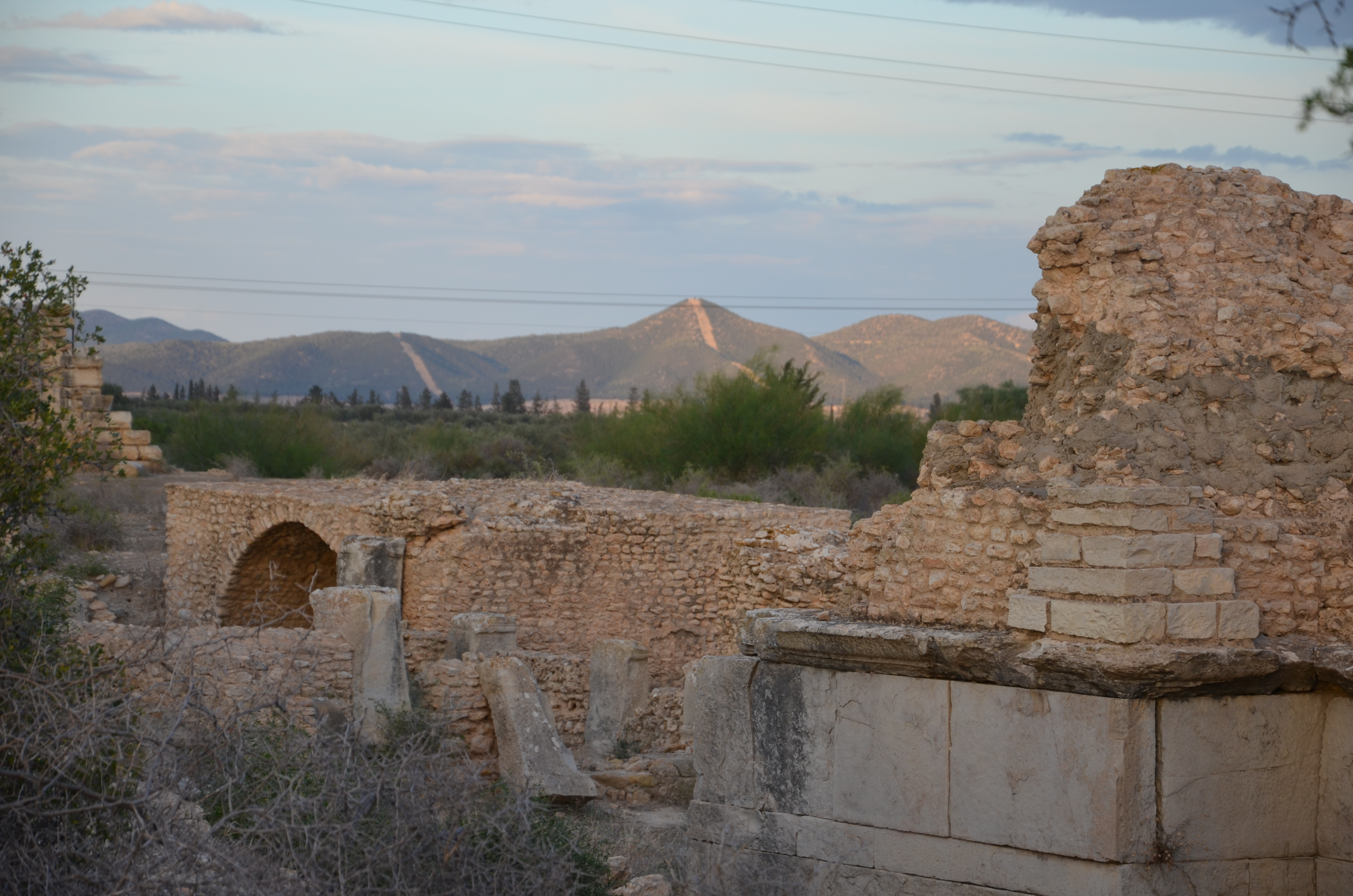 Temple